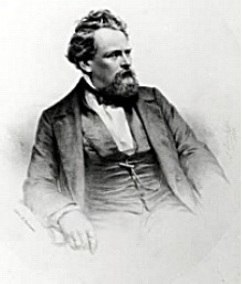 Josef Völk (1819–1882)